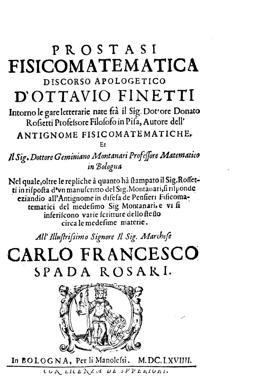 Prostasi fisicomatematica discorso apologetico d'Ottavio Finetti intorno le gare letterarie nate fra il sig. dottore Donato Rossetti ... autore dell'Antignome fisicomatematiche, et il sig. dottore Geminiano Montanari ... nel quale, oltre le repliche a quanto ha stampato il sig. Rossetti in risposta d'vn manuscritto del sig. Montanari, si risponde eziandio all'Antignome in difesa dei pensieri fisicomatematici del medesimo sig. Montanari, e vi si inseriscono varie scritture dello stesso circa le medesime materie. - In Bologna : per li Manolessi, 1669. - [8], 134, [2] p., [1] c. di tav. ripieg. : ill. calcogr. ; 4º. - Ottavio Finetti è pseudonimo di Geminiano Montanari (cfr. G. Melzi, Anonime e pseudonime, vol. 1, p. 416) .